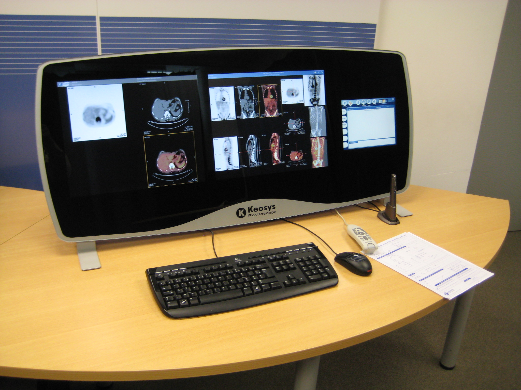 Estacion de trabajo medical Keosys